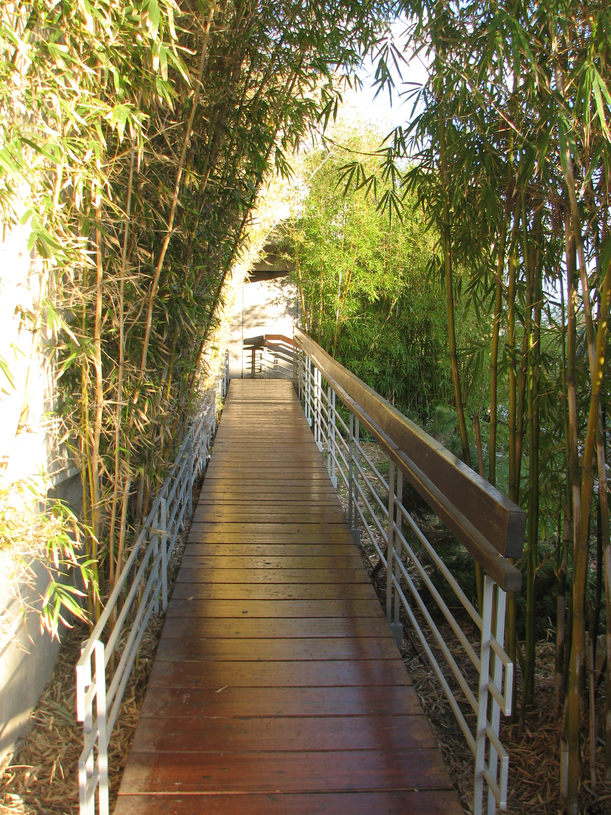 מראות מהר הכרמל בחיפה , נוף הנשקף מאזור המלונות רחוב יפה נוף, נמל חיפה, מפרץ חיפה, עכו והקריות מעבר למפרץ ולעיתים גם ראש הנקרה The bridge to the entrence to Tikotin Museum of Japanese Art by Dan Carmel Hotel גשר הכניסה למוזיאון טיקוטין לאמנות יפנית ליד מלון דן כרמל